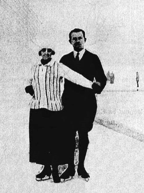 Alfred Berger et Helene Engelmann, champions olympiques de patinage en 1924 à Chamonix.